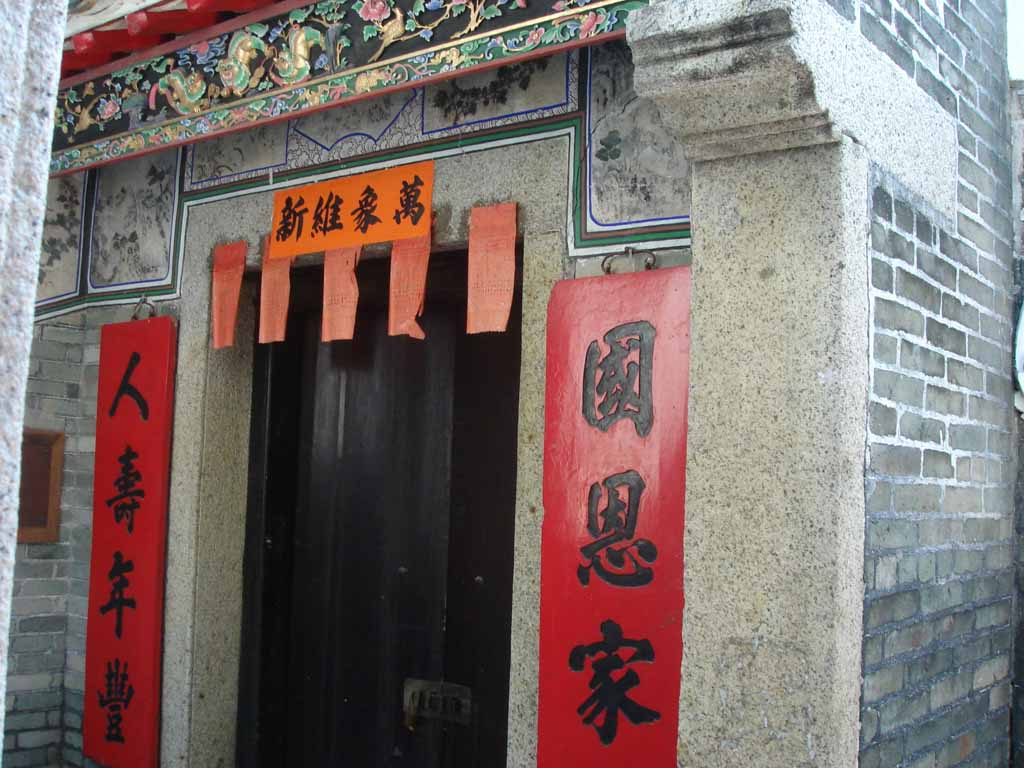 中文（香港）: 清暑軒正門。